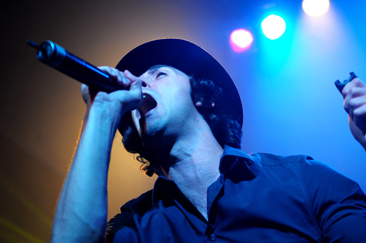 Maximo Park @ Club Capitol (17/11/2009)